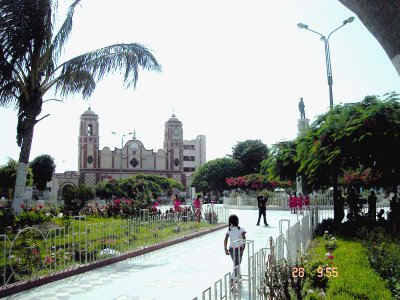 Monsefu